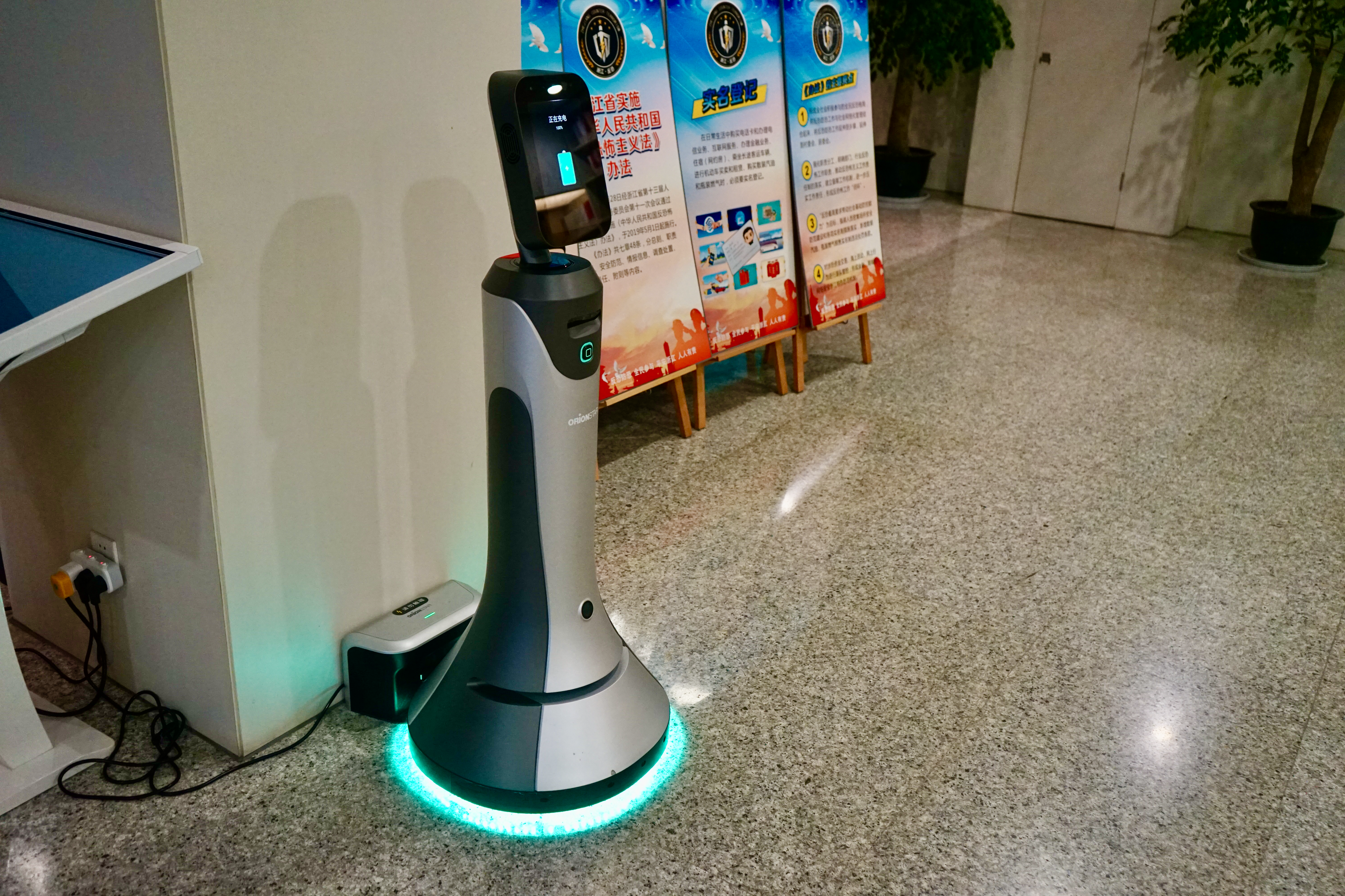 中文（中国大陆）: 海宁图书馆